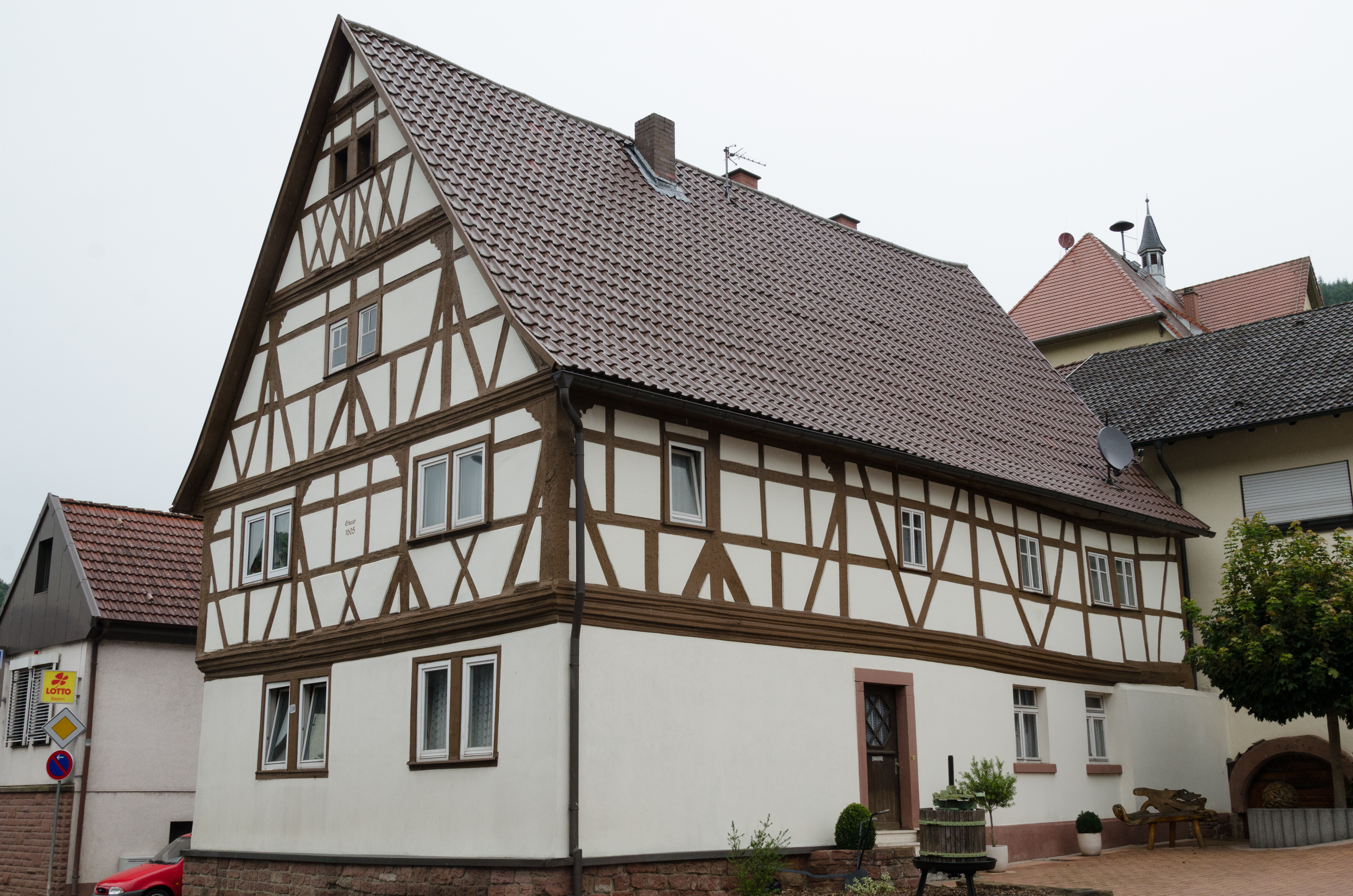 Eichenbühl, Hauptstraße 108 und 110